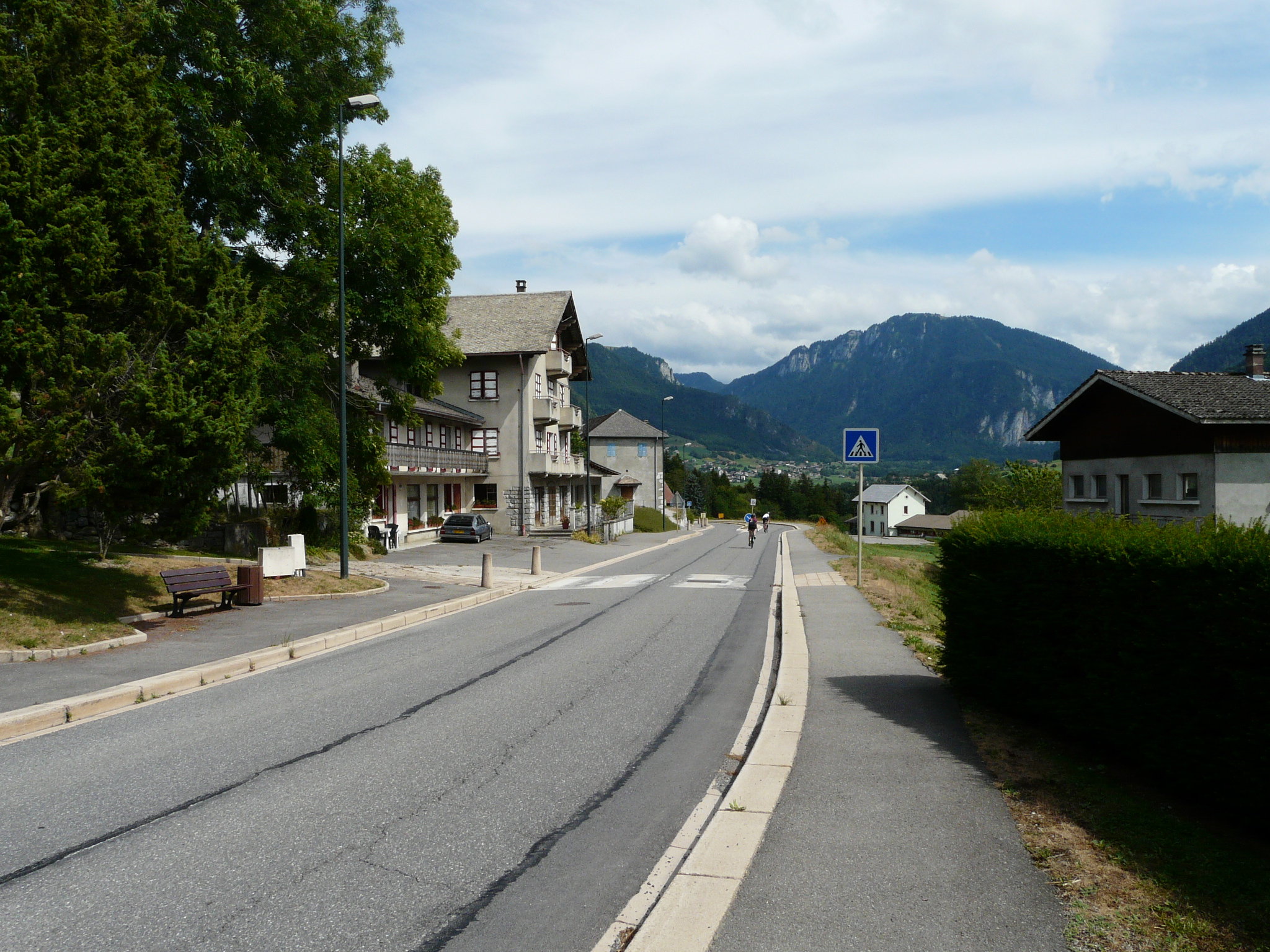 Chevenoz (Haute-Savoie, France) : traversée du village vers Abondance